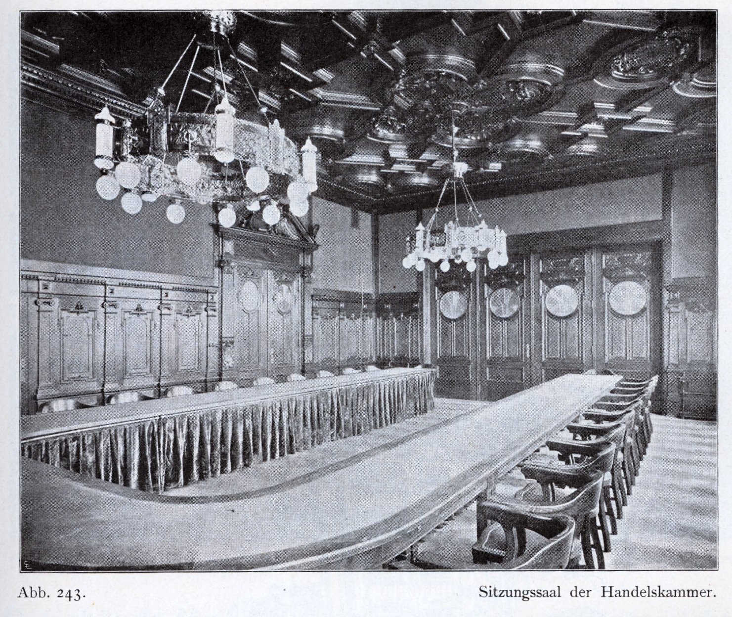 Haus der Handelskammer an der Graf-Adolf-Straße in Düsseldorf, von Architekt Hermann vom Endt Düsseldorf,_Sitzungssaal.jpg